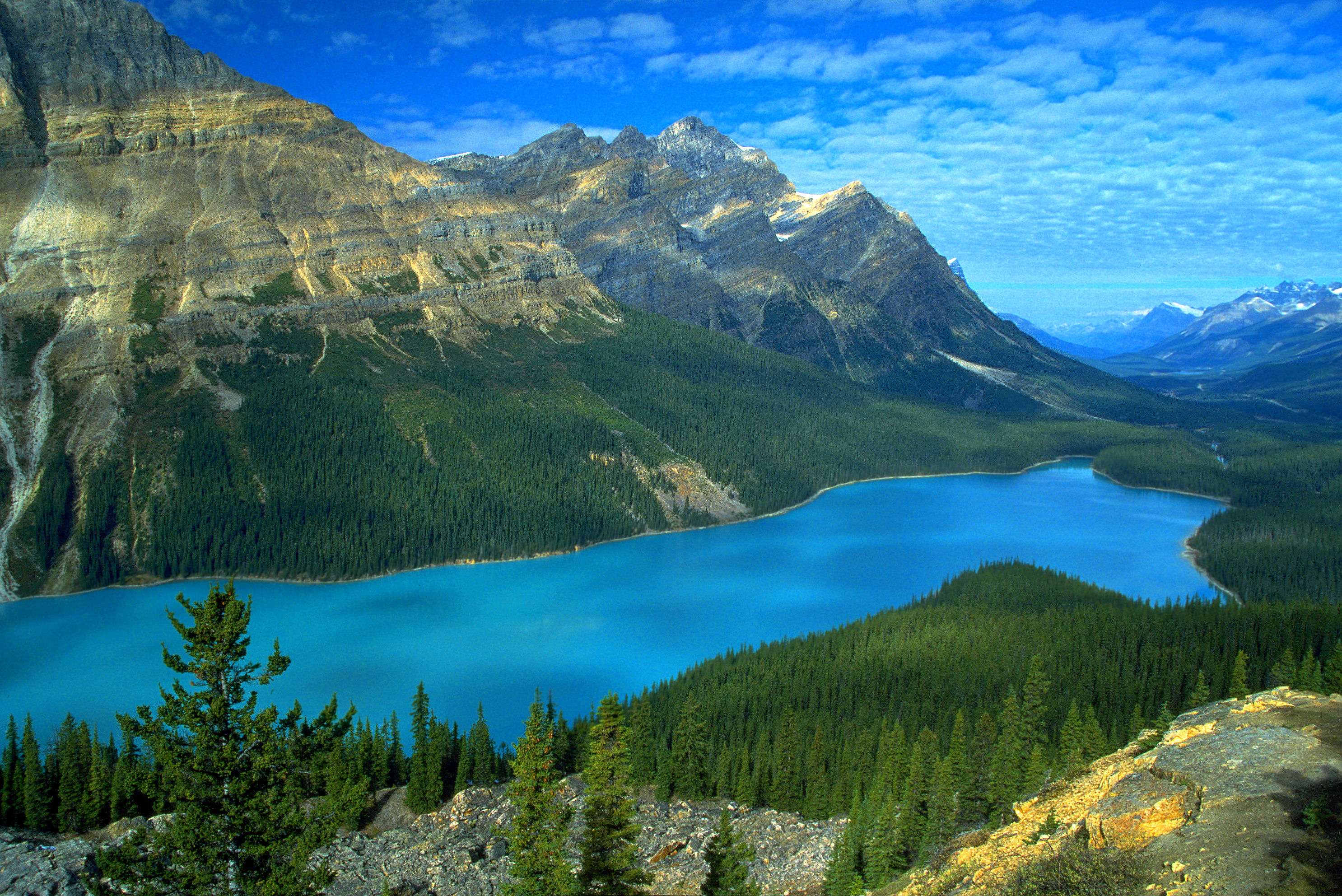 Lac Peyto - Lake Peyto. Wer auf dem Weg vom Jasper NP zum Banff NP ist, befindet sich in aller Regel auf einer der Traumstrassen dieser Welt, dem Icefield Parkway. Nach zwei Drittel des Weges ist der Peyto-Lake (Benannt nach den Trapper Bill Peyto) ausgeschildert. Nach einem kurzen Hike erreicht man diesen Viewpoint und wird vom Anblick fast erschlagen. So einsam wie auf dem Bild ist es hier jedoch nicht. Im 3/4 Takt werden hier die Touristen rangekarrt. Fotografiert mit Canon EOS 5 und Objektiv Sigma 17 -35mm, Belichtung 1/60 mit Stativ. Digitalisiert mit Minolta DiaScanner, EVB mit PSP 7 -Added to theCream of the Crop pool as most favorited.